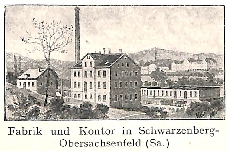 Schwarzenberg/Erzgeb. - (fiktive) Ansicht der Metallwarenfabrik F.W. Kutzschner (jun.) - das Kontor in Obersachsenfeld.